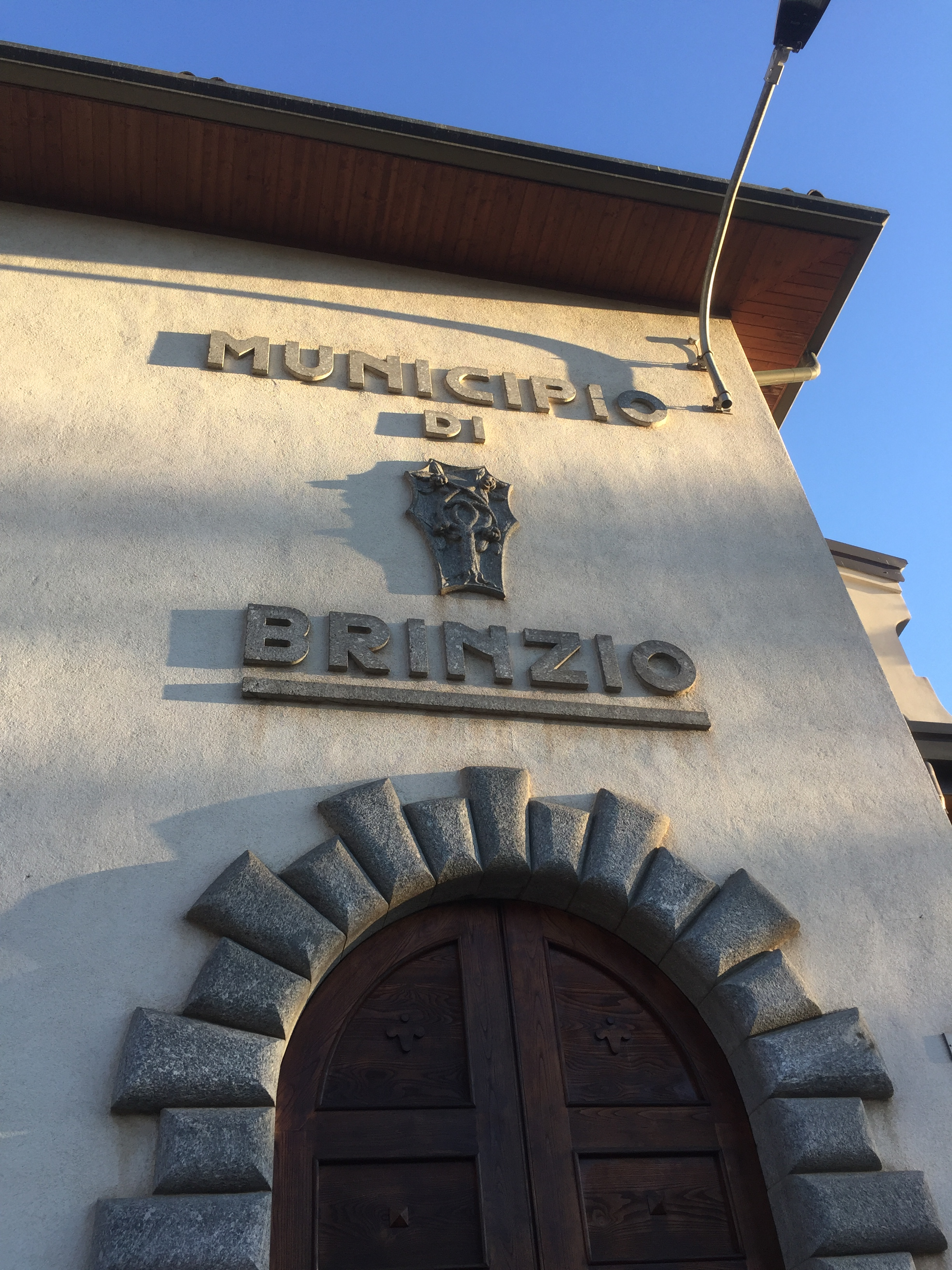 La facciata del municipio di Brinzio